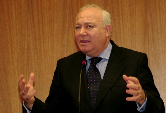 Miguel Ángel Moratinos durante una rueda de prensa en Brasil en abril de 2008.